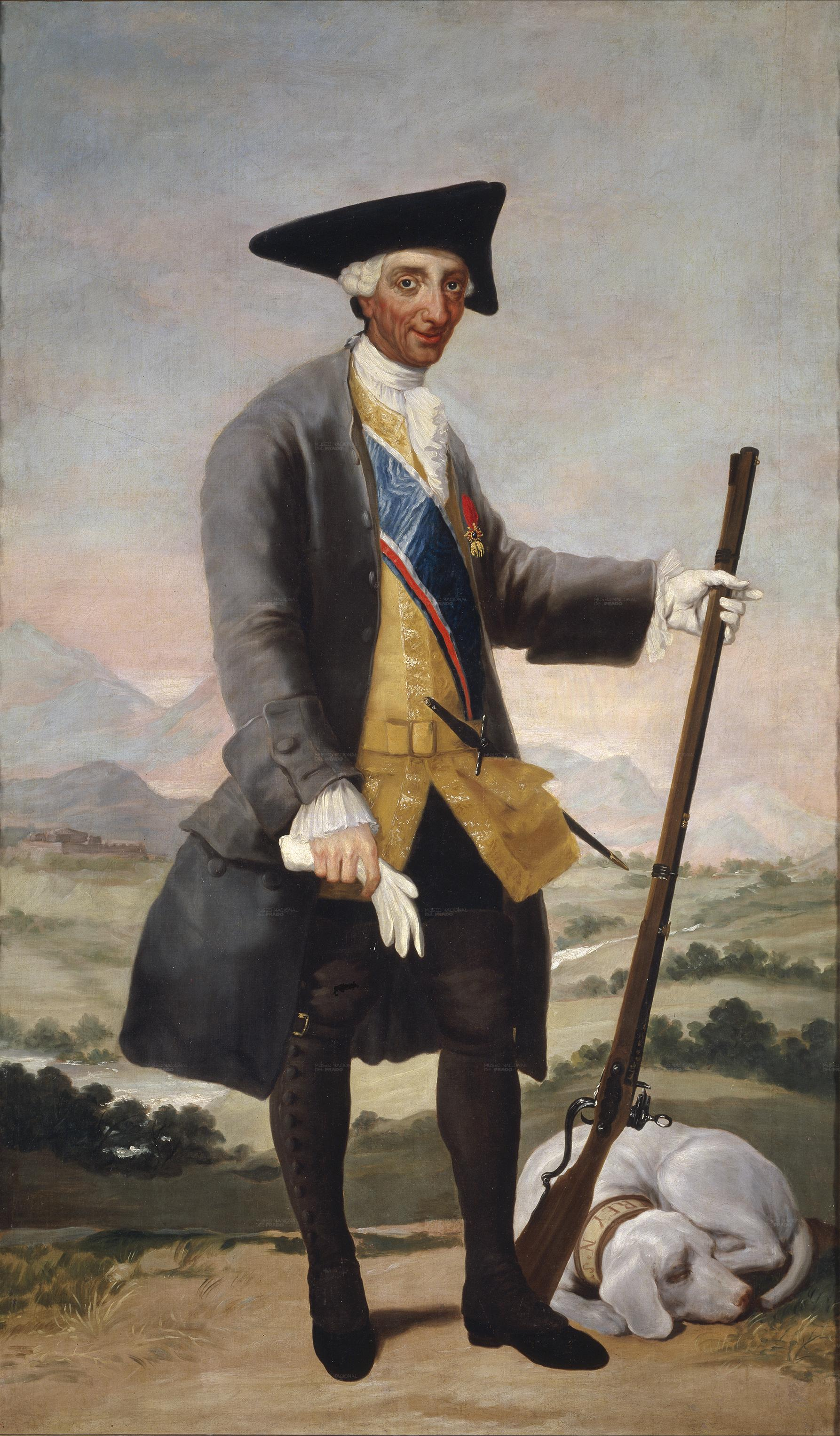 Carlos III cazadorKing Charles III as a hunterlabel QS:Les,"Carlos III cazador"label QS:Len,"King Charles III as a hunter"